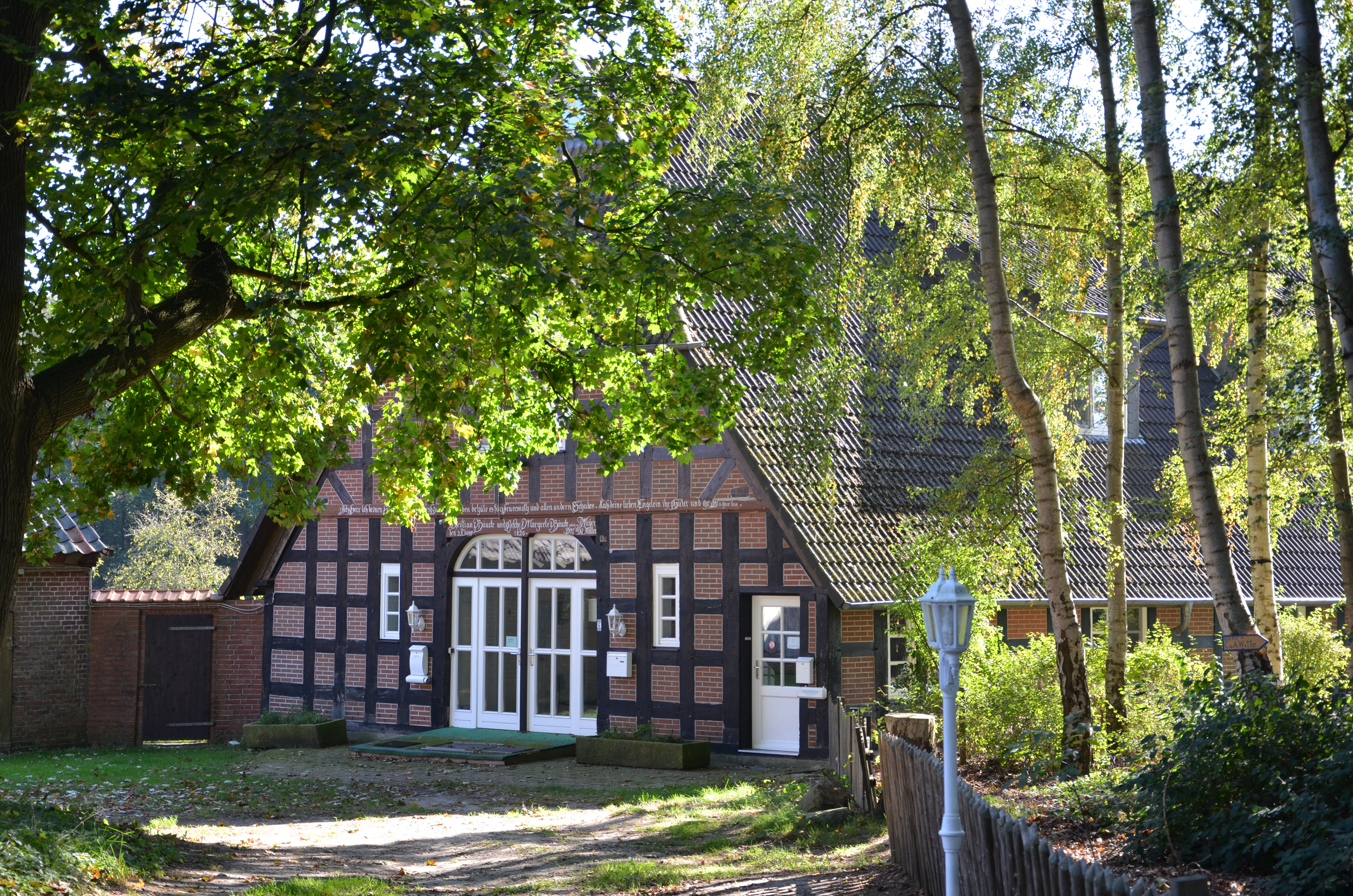 Bassum Baudenkmla Bramstedt Feldstraße 6